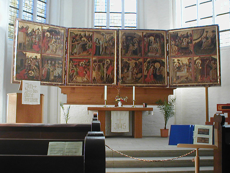 Marienaltar in der St. Johanniskirche in Malchin, Mecklenburg-Vorpommern, Deutschland